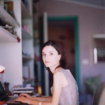 Cinzia Giorgio Depicted person: Cinzia Giorgio – Italian writer